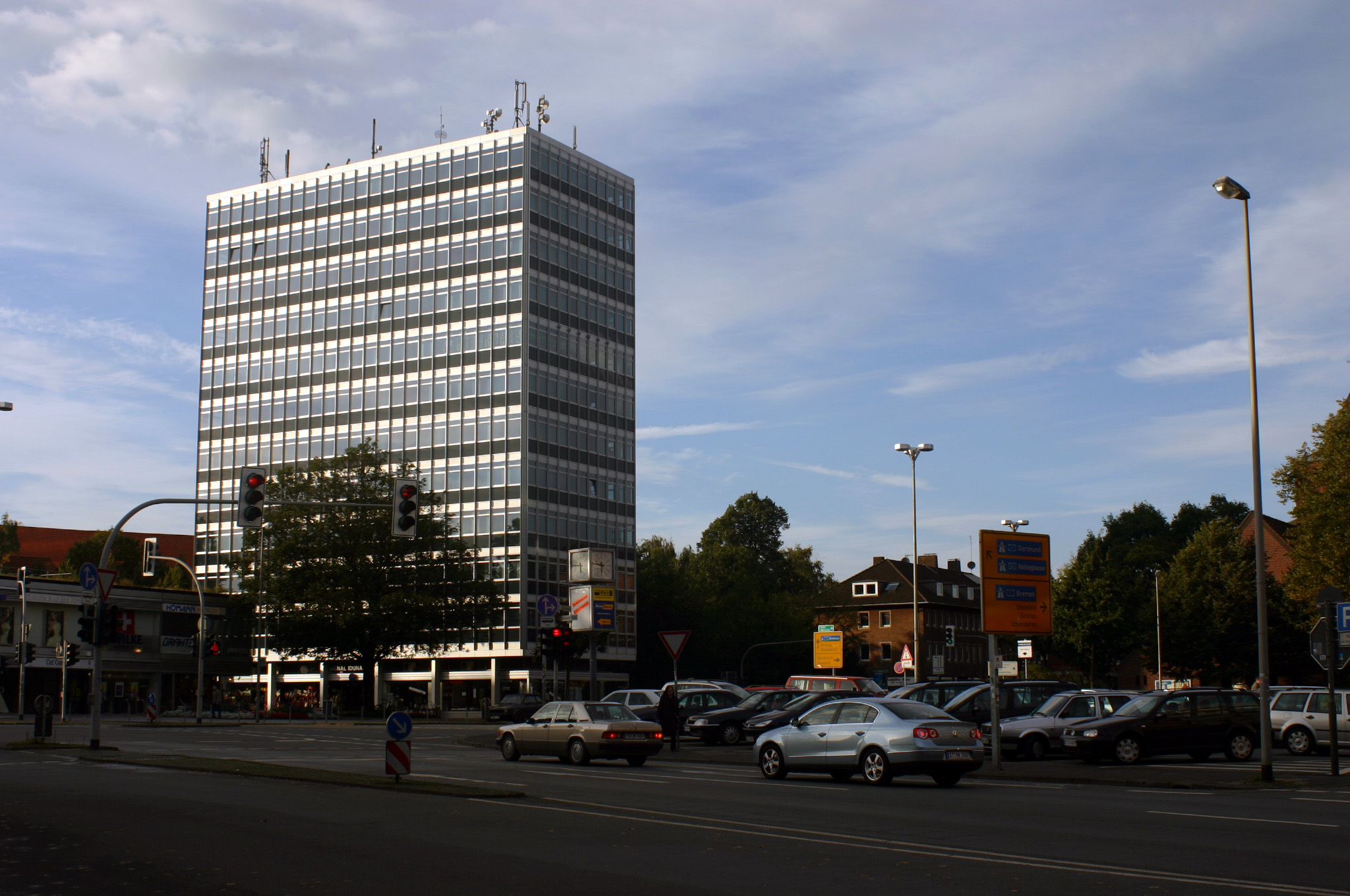 Münster, Germany, Servatiiplatz mit "Iduna-Hochhaus"